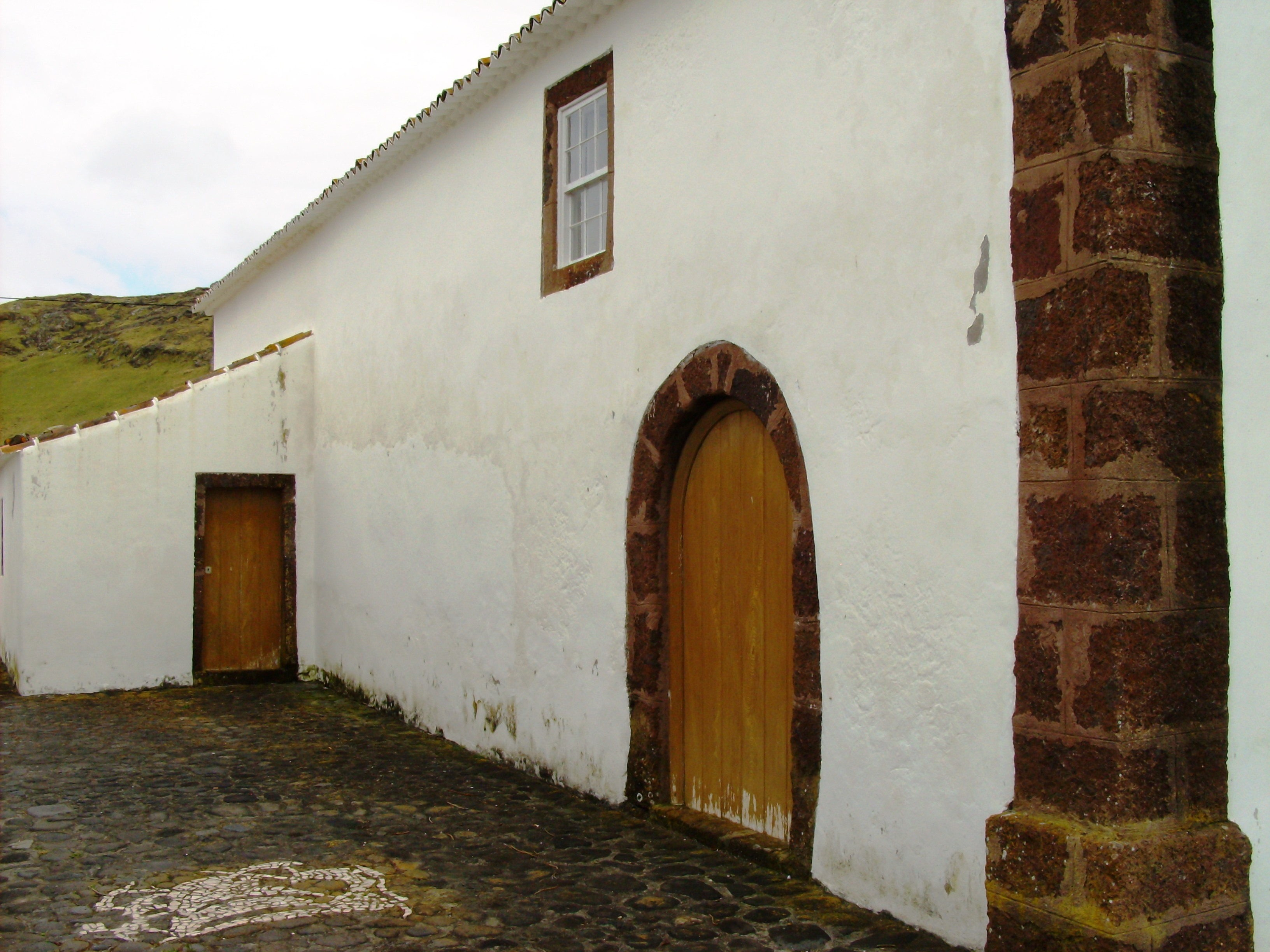 Ermida de Nossa Senhora dos Anjos, Ilha de Santa Maria (Açores), Portugal.